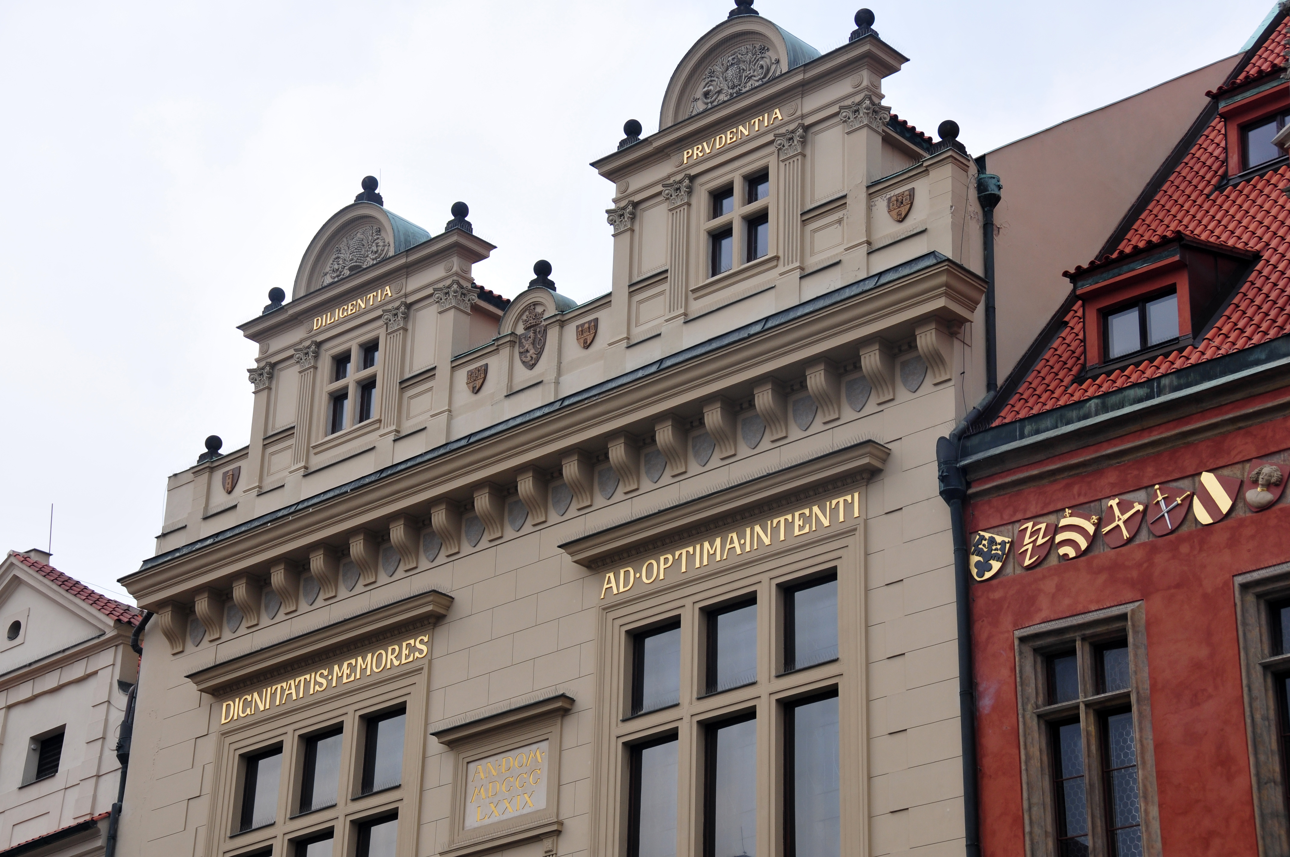 Prag